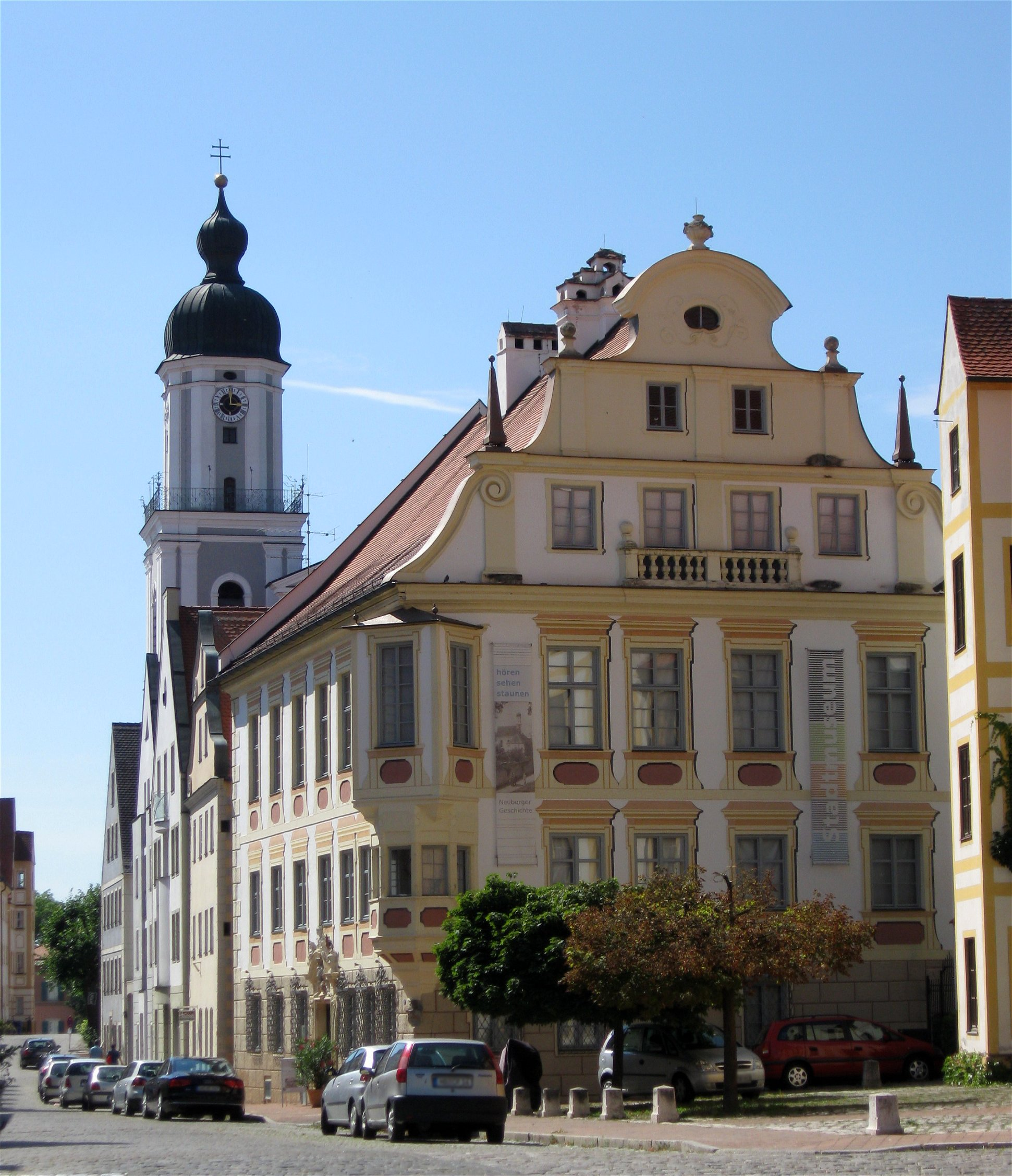 Amalienstraße A 19; ehemaliges Adelspalais, sog. Weveldhaus, jetzt Stadtmuseum, stattlicher dreigeschossiger Bau mit Eckerker im Südosten und lisenengegliedertem geschwungenen Ostgiebel, reiche Fassadengliederung, 1515/17, Umbau von Thomas Limbrunner 1714/16, ab 1718 durch Johann Puchtler. D-1-85-149-7